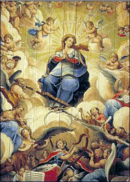 Madonna